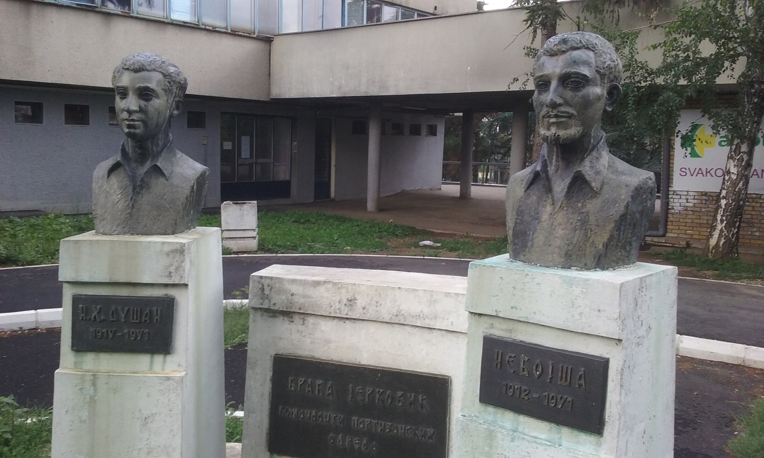 Споменик Браћи Душану и Небојши Јерковићу у насељу Браћа Јерковић у Београду.